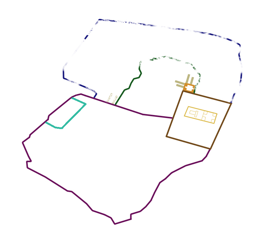 ירושלים 70 - רביעיית סוללות נוספות באנטוניה